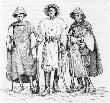 Interprètes indigènes attachés aux commandants des colonnes du haut Sénégal (illustrations de Côte occidentale d'Afrique du colonel Frey - [Fig.125 p.221 - Cote : Réserve A 200 386]